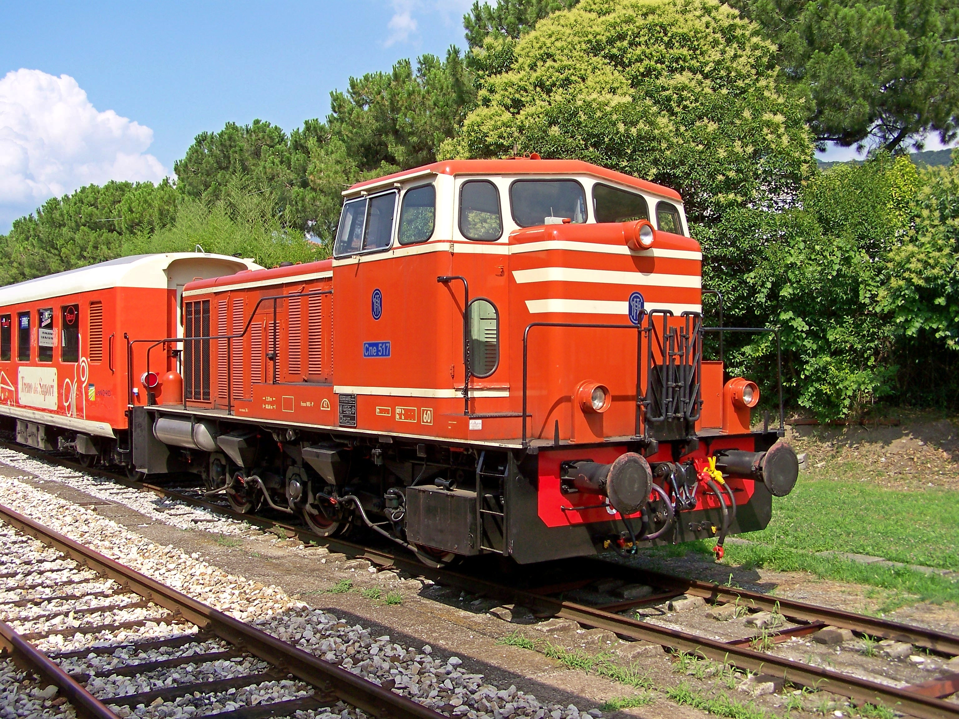 Il Cne 517 in sosta sul quarto binario di Iseo a causa dell'improvvisa mancanza di spazio nel Deposito di Iseo dopo l'arrivo degli ATR 115.